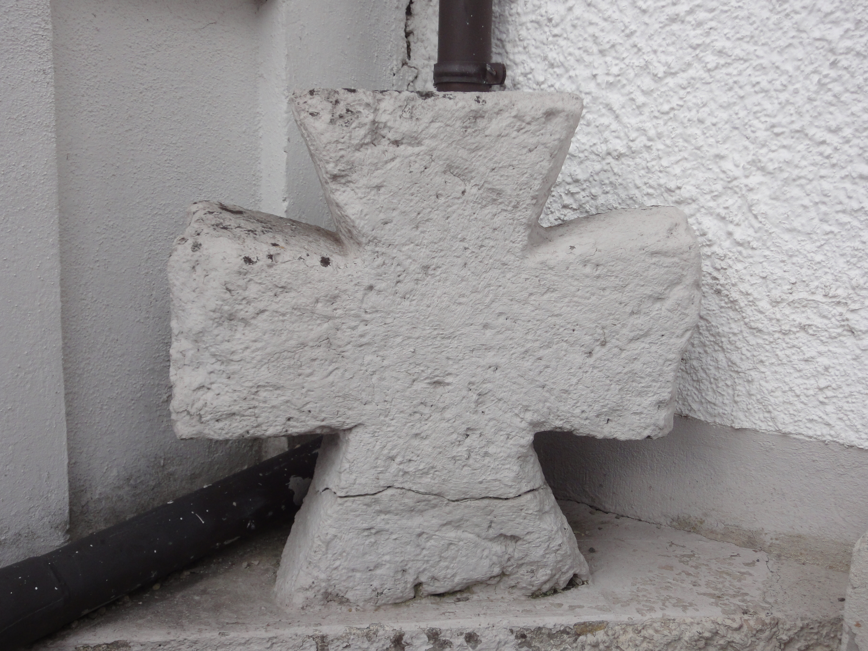 Steinkreuz, mittelalterlich, auf dem Friedhof Gersthofen-Hirblingen